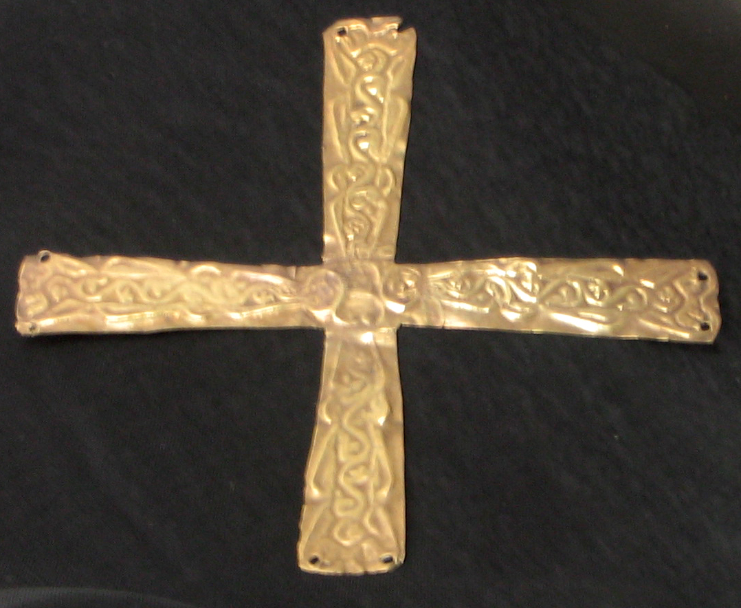 Crocetta longobarda sbalzata, di area bergamasca, nell'ex Museo archeologico di Bergamo. Foto di Giorces.